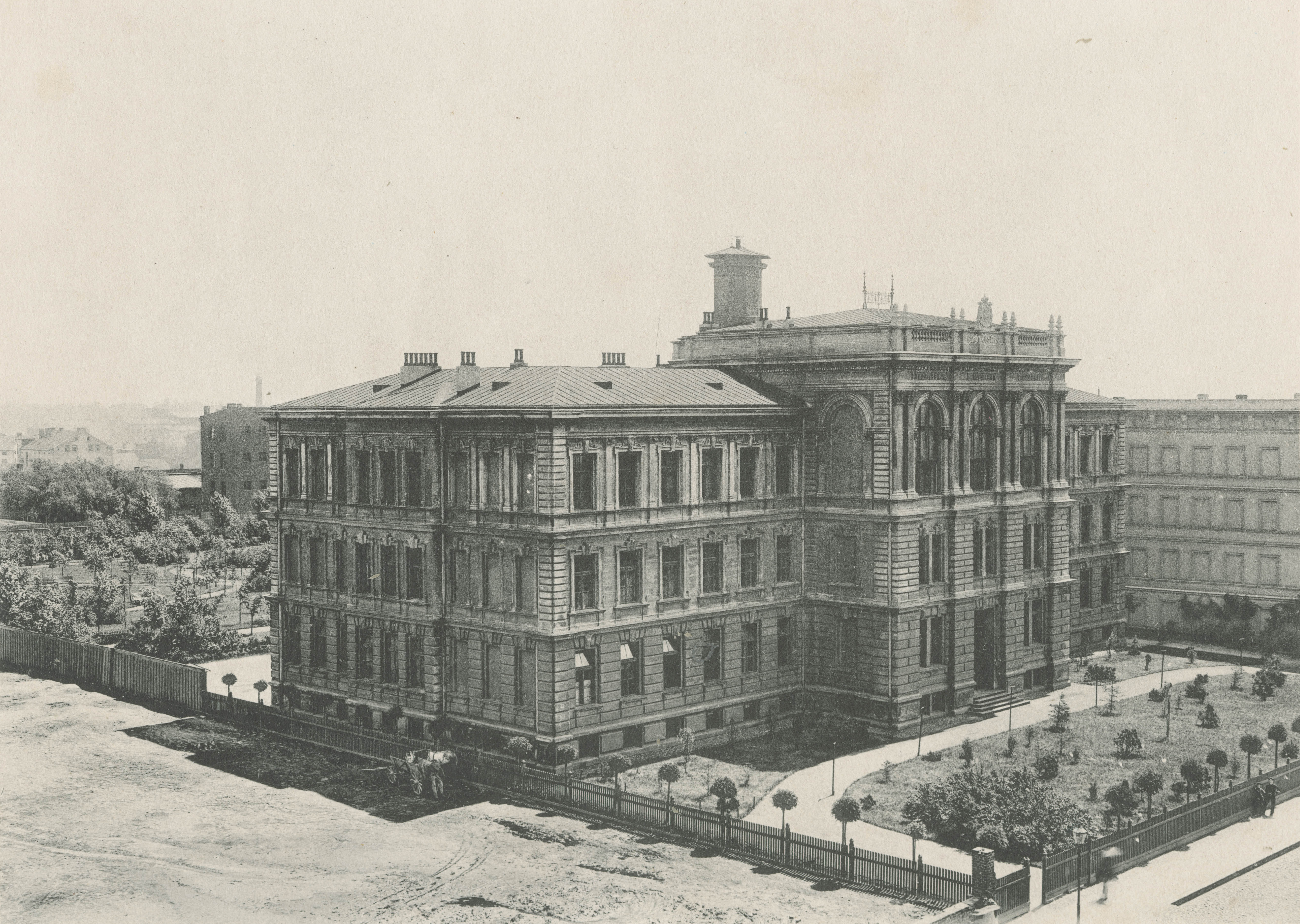 Fotografia Bronisława Wilkoszewskiego z albumu „Widoki m. Łodzi” ukazująca Miejskie Gimnazjum Męskie mieszczące się przy ul. Dzikiej (ob. Sienkiewicza), a także pusty plac po jego lewej stronie, który w 1896 roku został przeznaczony na potrzeby parku publicznego (późniejszego Parku Mikołajewskiego; ob. park Henryka Sienkiewicza). Po utworzeniu w 1886 roku dwóch gimnazjów rosyjskojęzycznych (męskiego i żeńskiego), mieszczących się początkowo w jednym budynku przy ul. Cegielnianej 64 (ob. Jaracza) pojawiła się koncepcja powstania osobnego gmachu dla szkoły męskiej. Zaprojektowania budynku szkoły podjął się ówczesny architekt miejski Hilary Majewski, a jego budowę zobowiązał się już wcześniej wesprzeć Karol Scheibler (istniał osobny zapis w jego testamencie uwzględniający to przedsięwzięcie). Budowa obiektu trwała w latach 1888-1891. Gimnazjum funkcjonowało do wybuchu I Wojny Światowej, w czasie której szkoła mieściła szpital wojskowy. Po zakończeniu wojny budynek był siedzibą Miejskiego Gimnazjum Męskiego im. J. Piłsudskiego (patronat ten otrzymało w 1921 roku) o profilu matematyczno-przyrodniczym. Po II Wojnie Światowej przekształcono je w I Miejskie Gimnazjum i Liceum (otrzymując w 1946 roku patronat Tadeusza Kościuszki). W 1956 roku szkołę przekształcono w koedukacyjne III Liceum Ogólnokształcące im. T. Kościuszki, którym pozostaje do dzisiaj. W latach 50. i 60. XX wieku gmach szkolny podlegał rozbudowie o kolejne skrzydła mieszczące sale gimnastyczną i basen czy w końcu odrębne skrzydło szkolne, które od września 1962 roku funkcjonuje jako Szkoła Podstawowa nr 162. Absolwentami tej prestiżowej szkoły byli m.in. Julian Tuwim, Piotr Skrzynecki, Jan Karski, Jan Machulski, Stefan Niesiołowski. Również wśród przedstawicieli młodszego pokolenia znaleźć można osoby które są absolwentami „trójki” m.in. Marcin Bosak czy Aleksandra Urbańczyk.